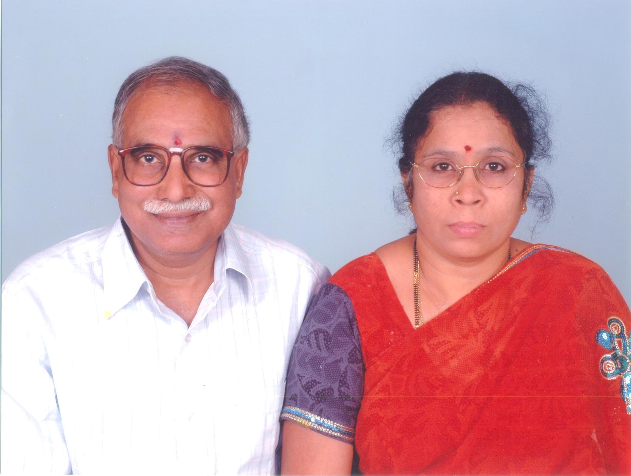 పూసపాటి కృష్ణసూర్యకుమార్ మరియు నాగమణి